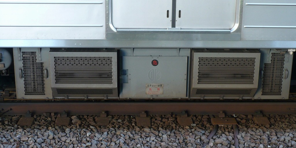 東武20000系のチョッパ装置